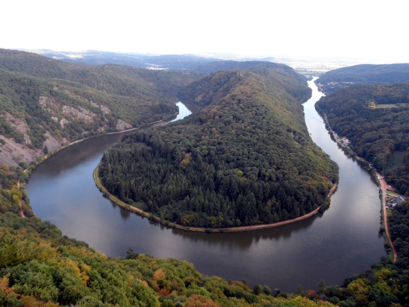 Saarschleife, vom Aussichtsturm des Baumwipfelpfades Saarschleife gesehen